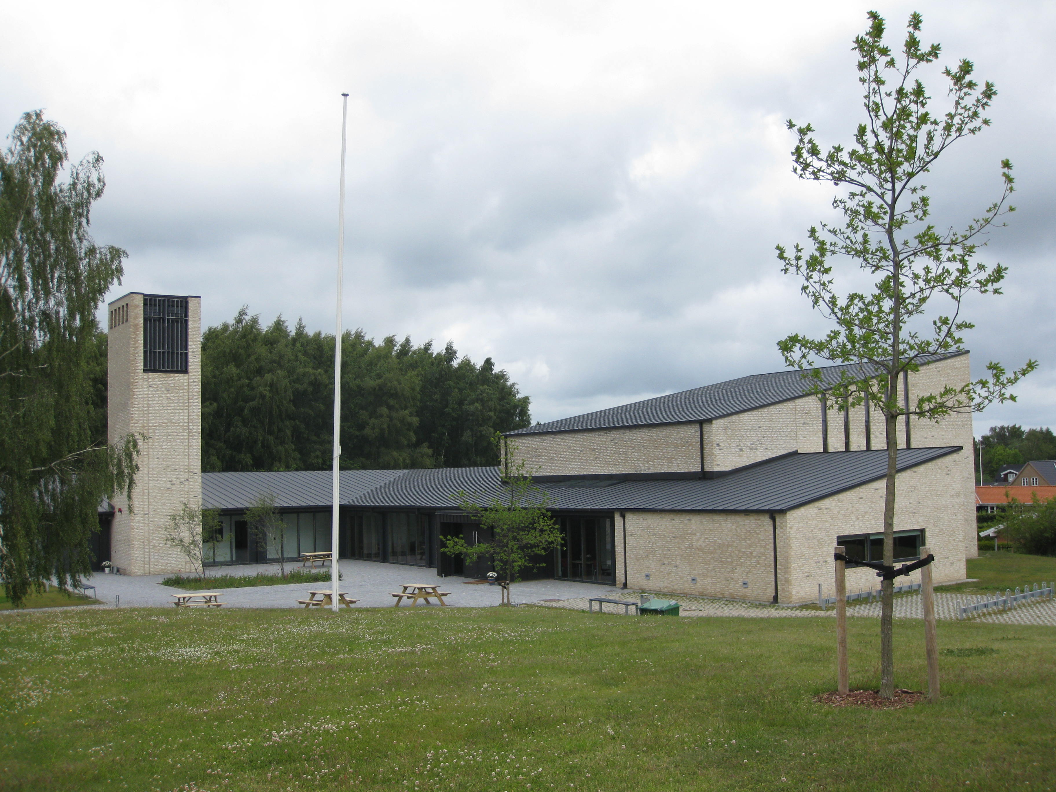 Grønnevang kirke